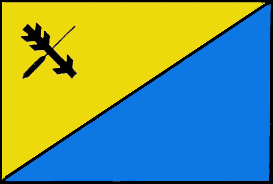 Vlajka obce Kytlice